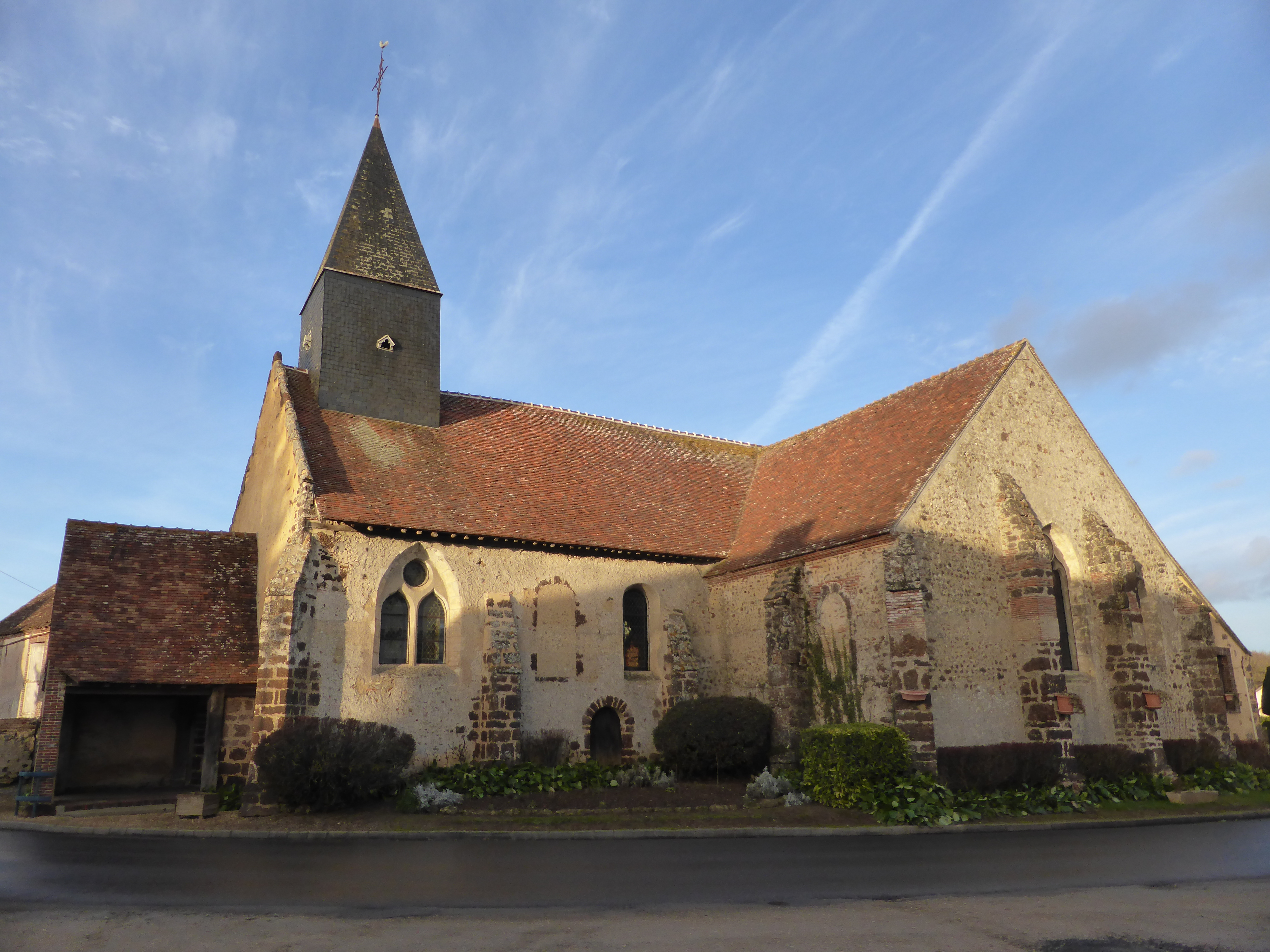 Église Saint-Barthélemy du Mesnil-Thomas, en Eure-et-Loir.